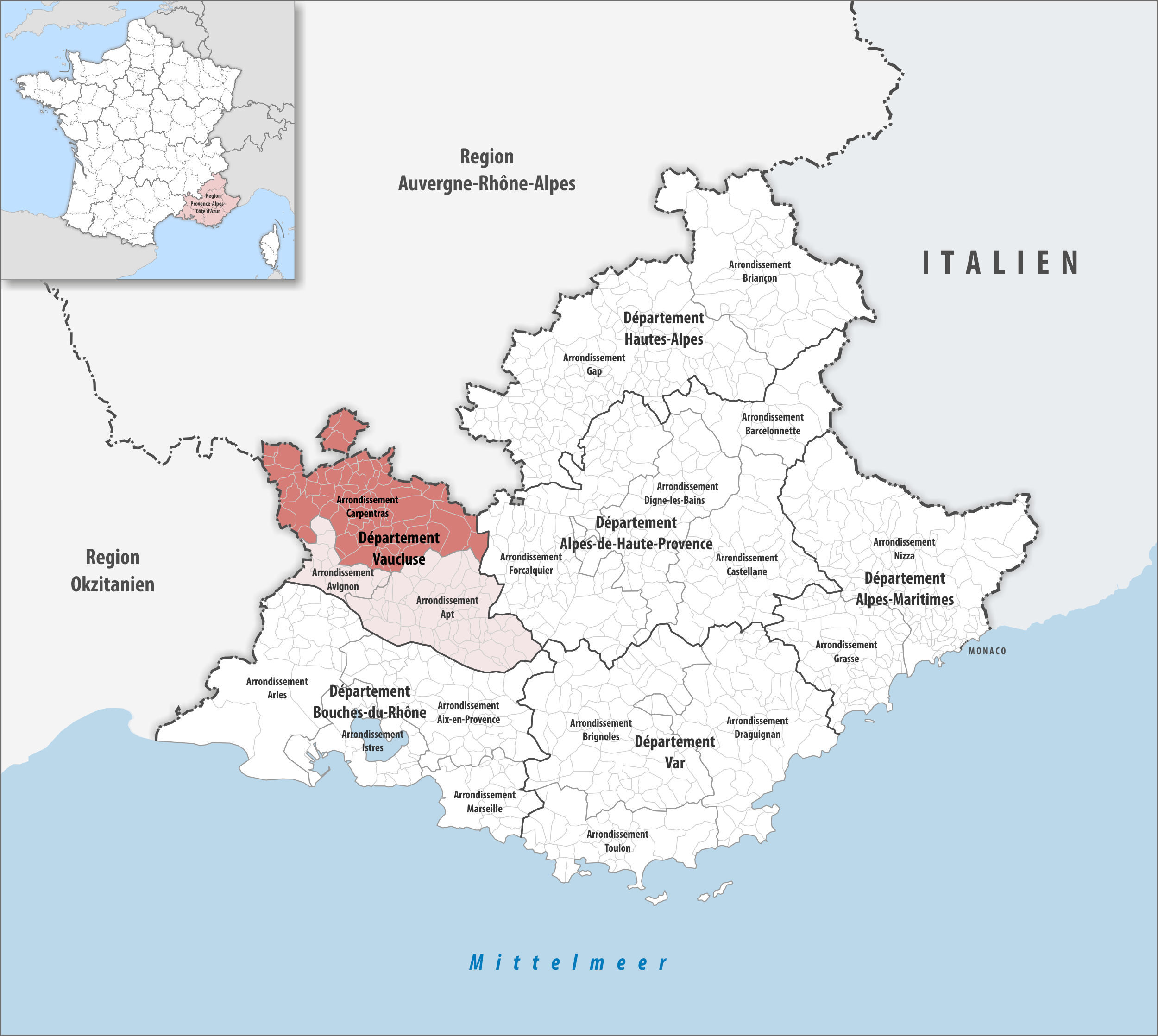 Lage des Arrondissements Carpentras